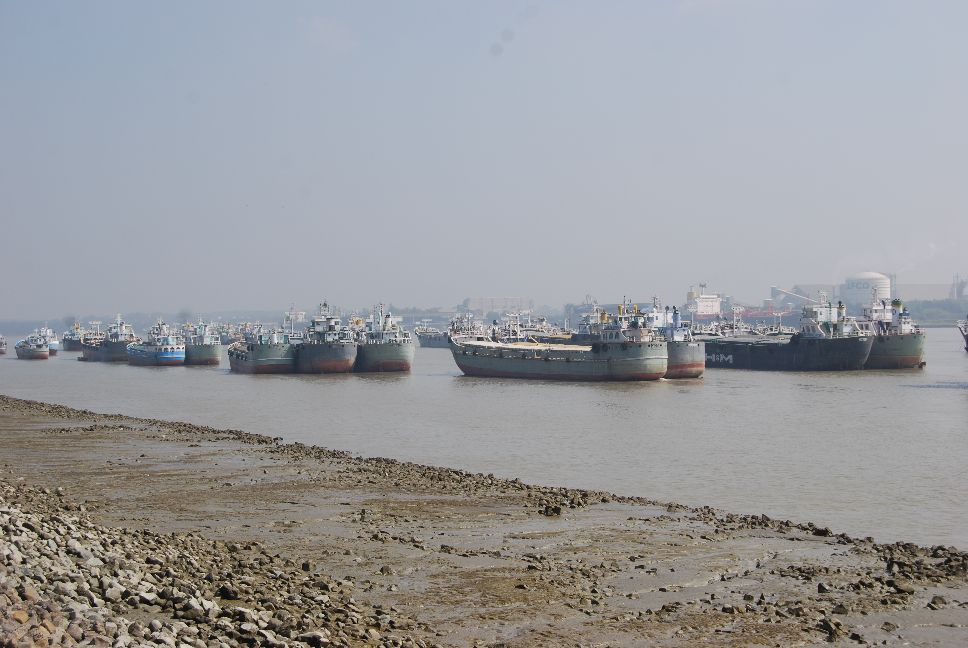 Chittagong Port Channel, Chittagong, Bangladesh.